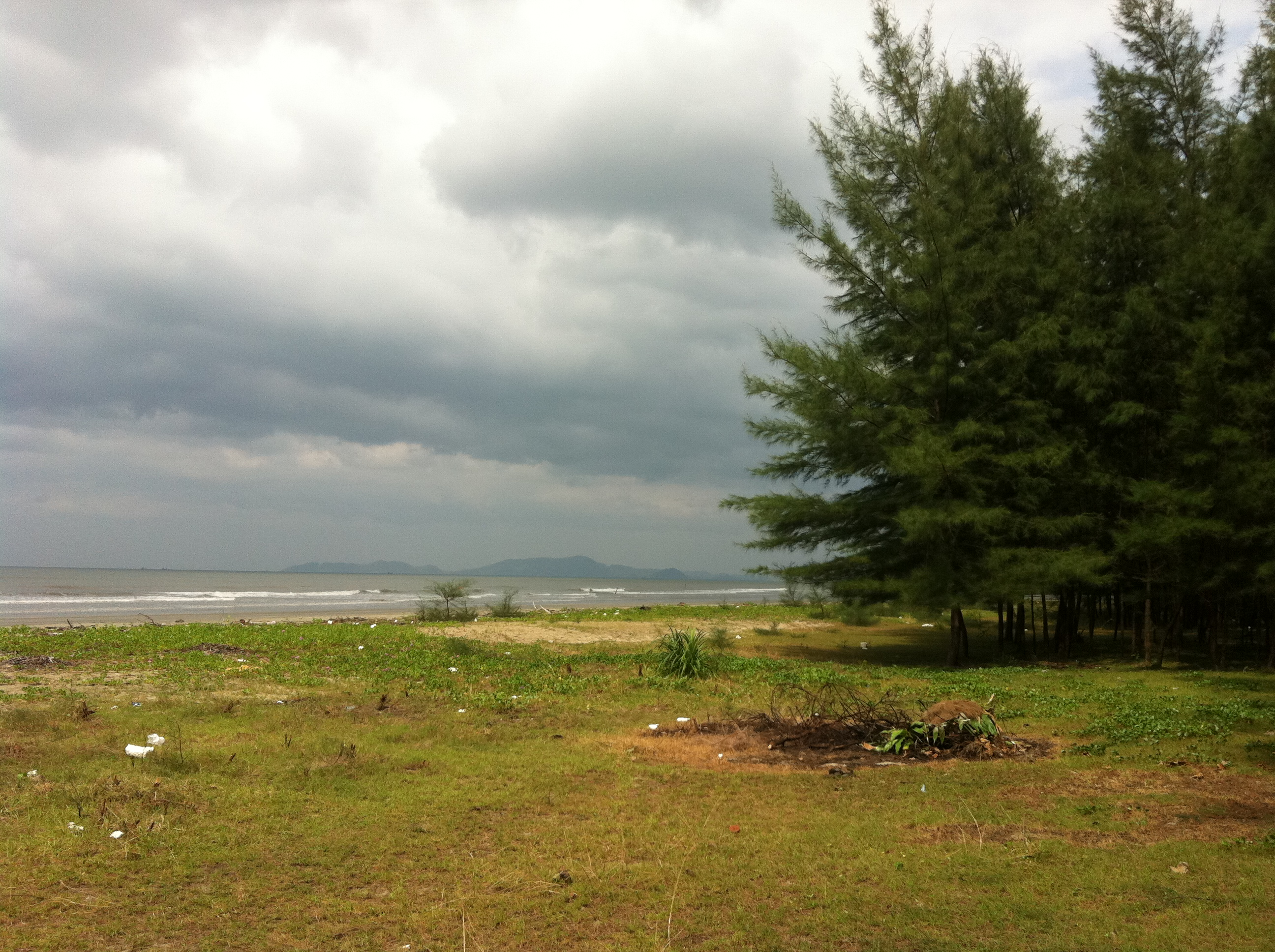 Muang Klang, Kapoe District, Ranong, Thailand